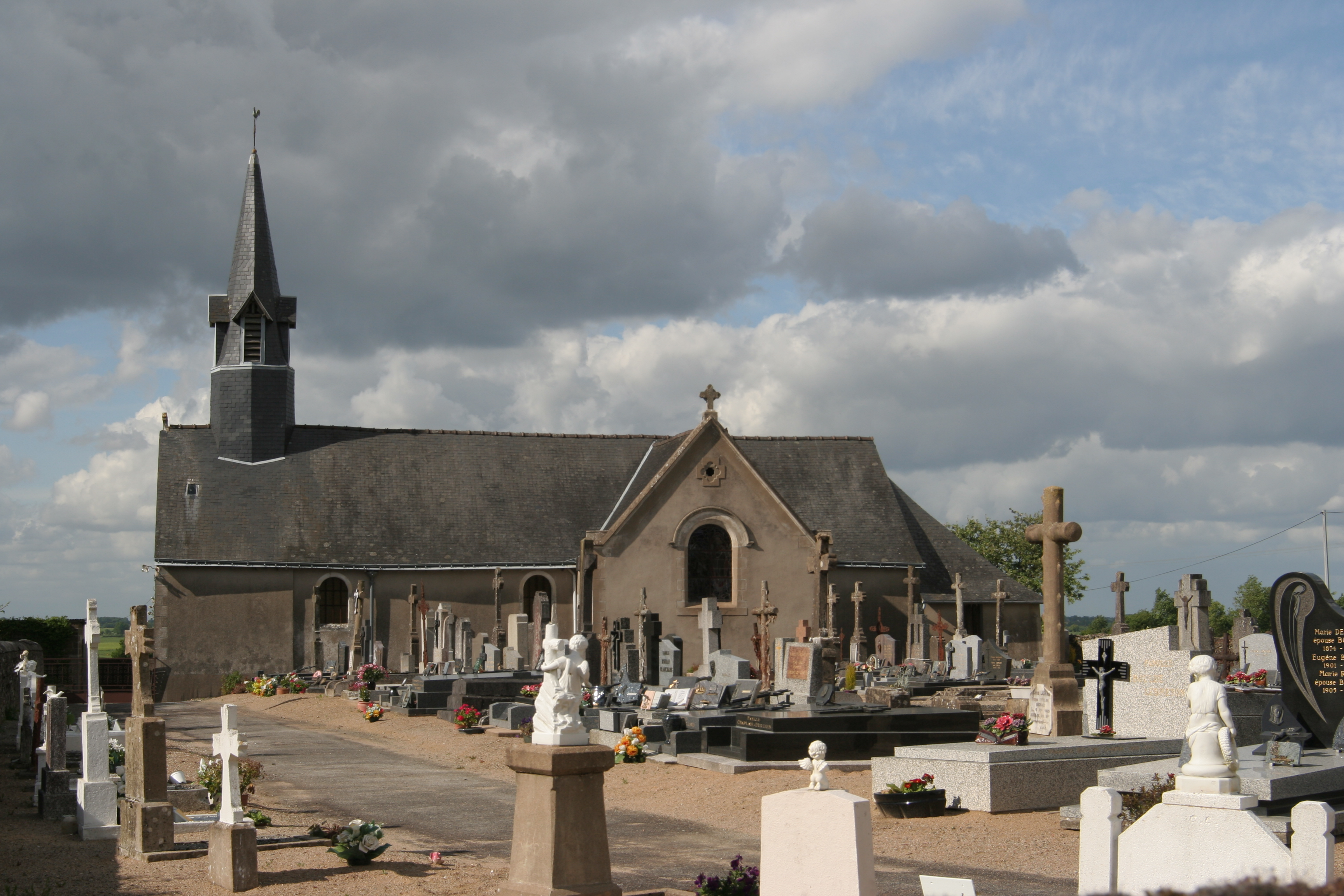 Église et cimetière de Saint-Erblon.